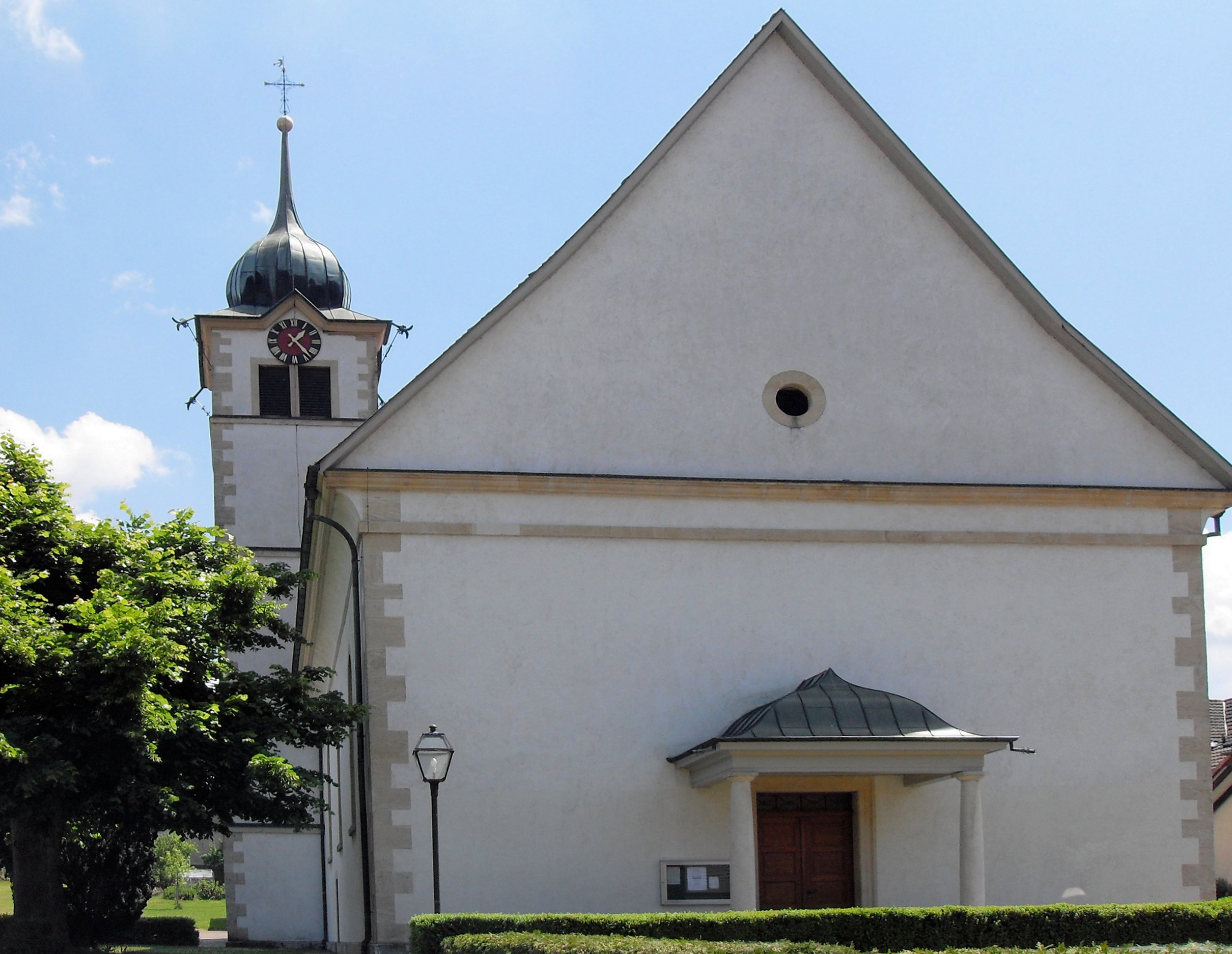 Kirche St. Gallus in Hochwald, Kanton Solothurn, Schweiz